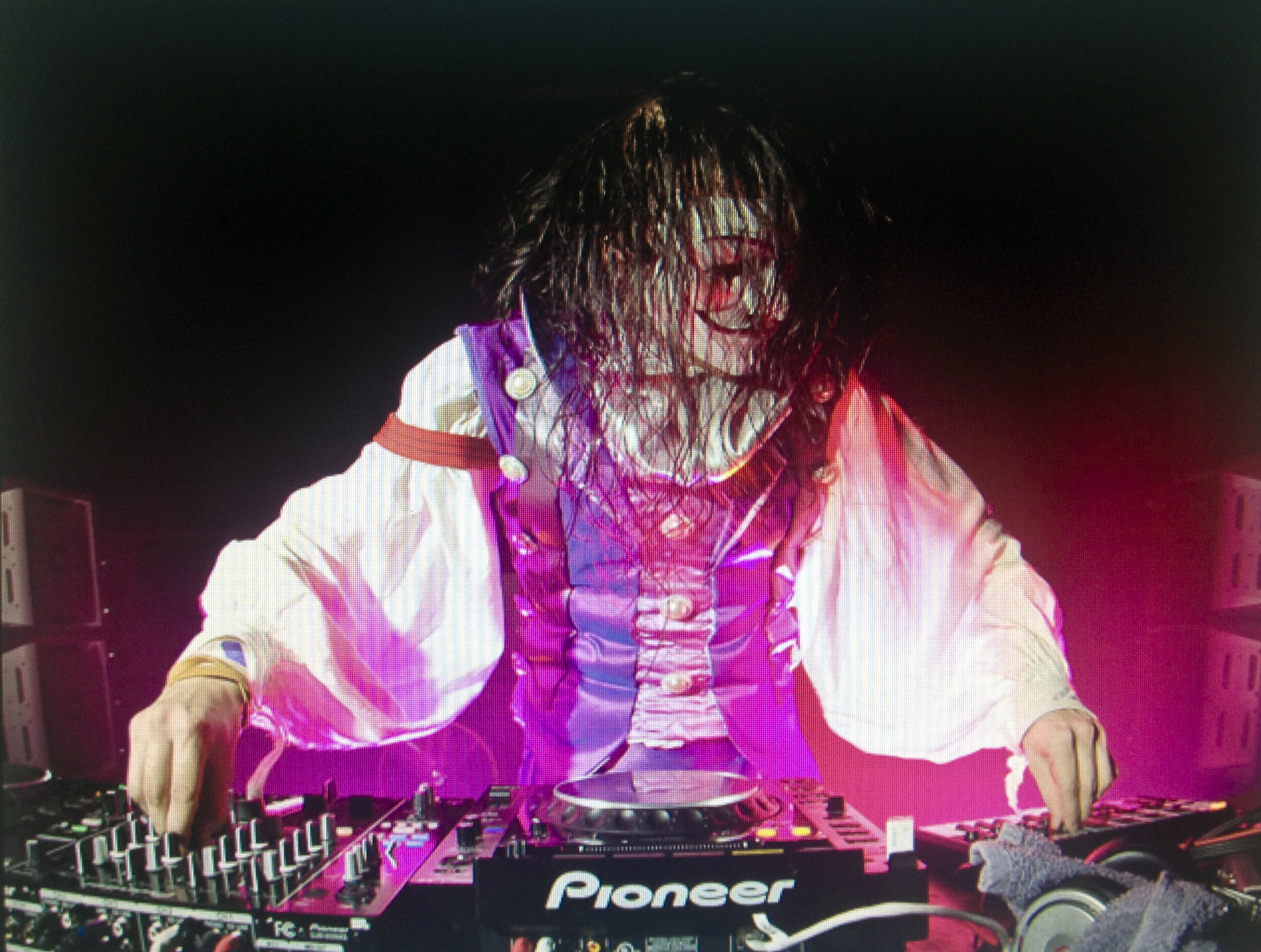 Savant en Vivo, fotografía por el usuario de la Wikipedia en italiano, Moncio89